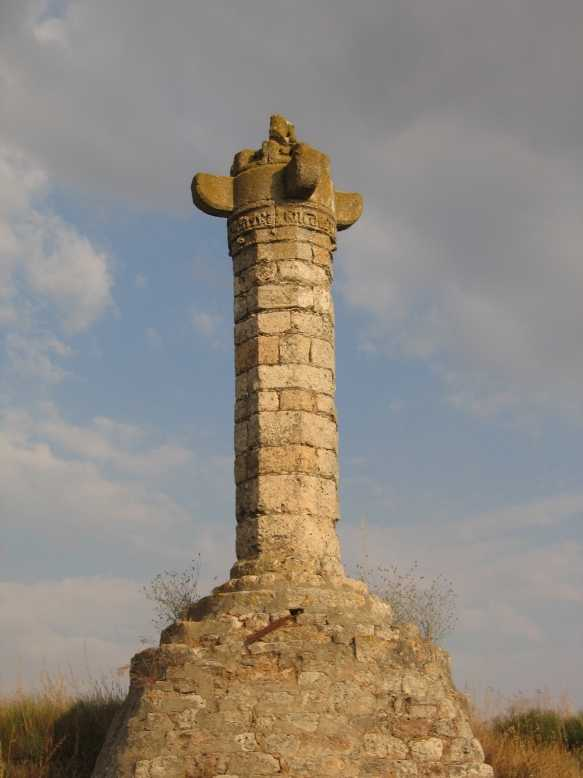 Picota de Presencio. Foto tomada por Sanbec